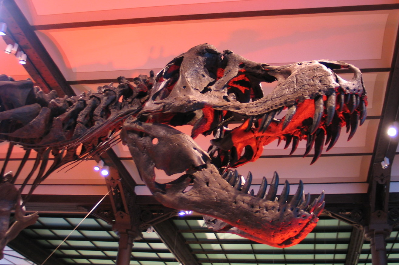 Head of a Tyrannosaurus Rex at the Museum voor Natuurwetenschappen in Brussels, Belgium